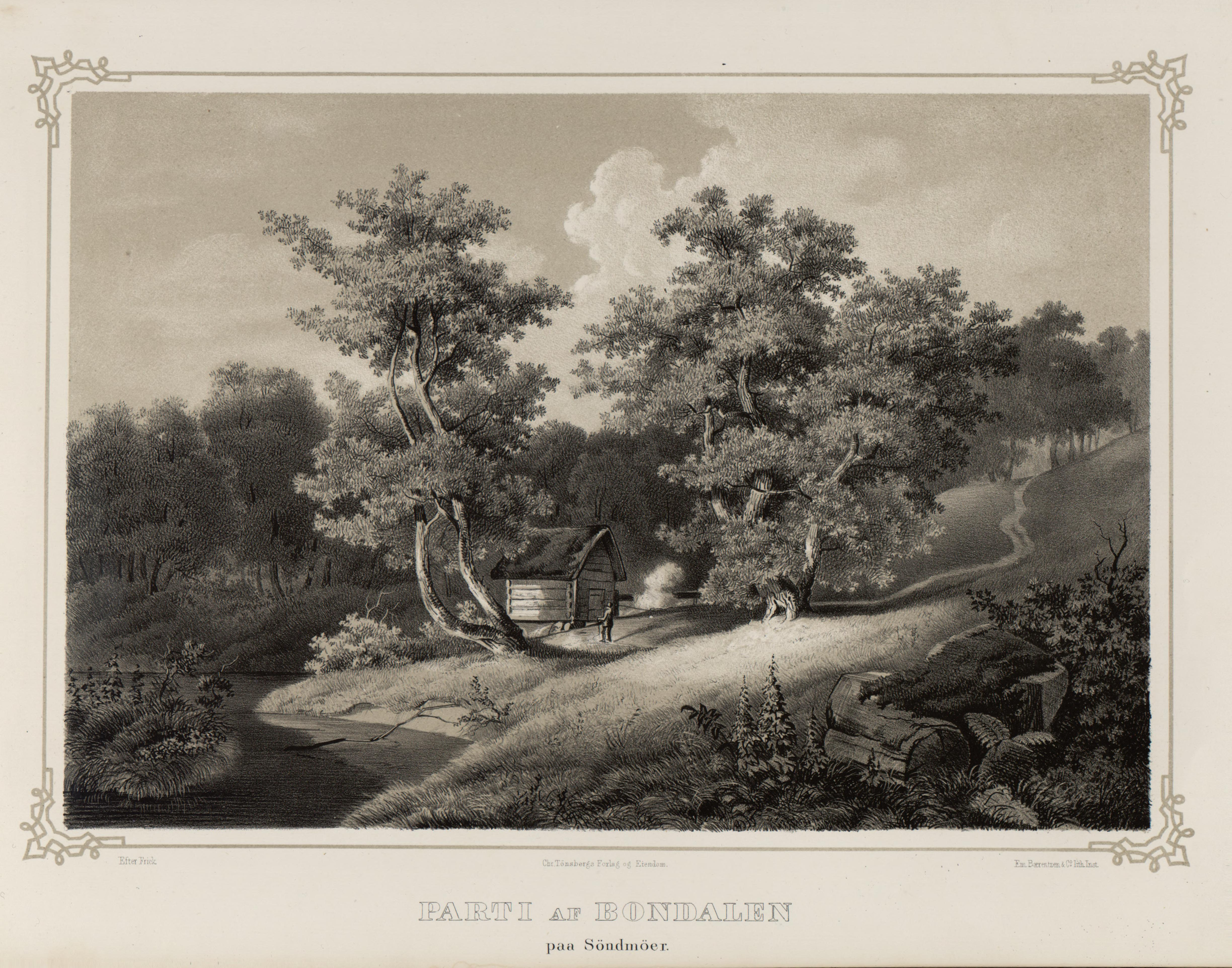 Illustrasjon hentet fra boken "Norge fremstillet i Tegninger" av Asbjørnsen, P.Chr. og utgitt av Chr. Tønsberg (no, 1848)